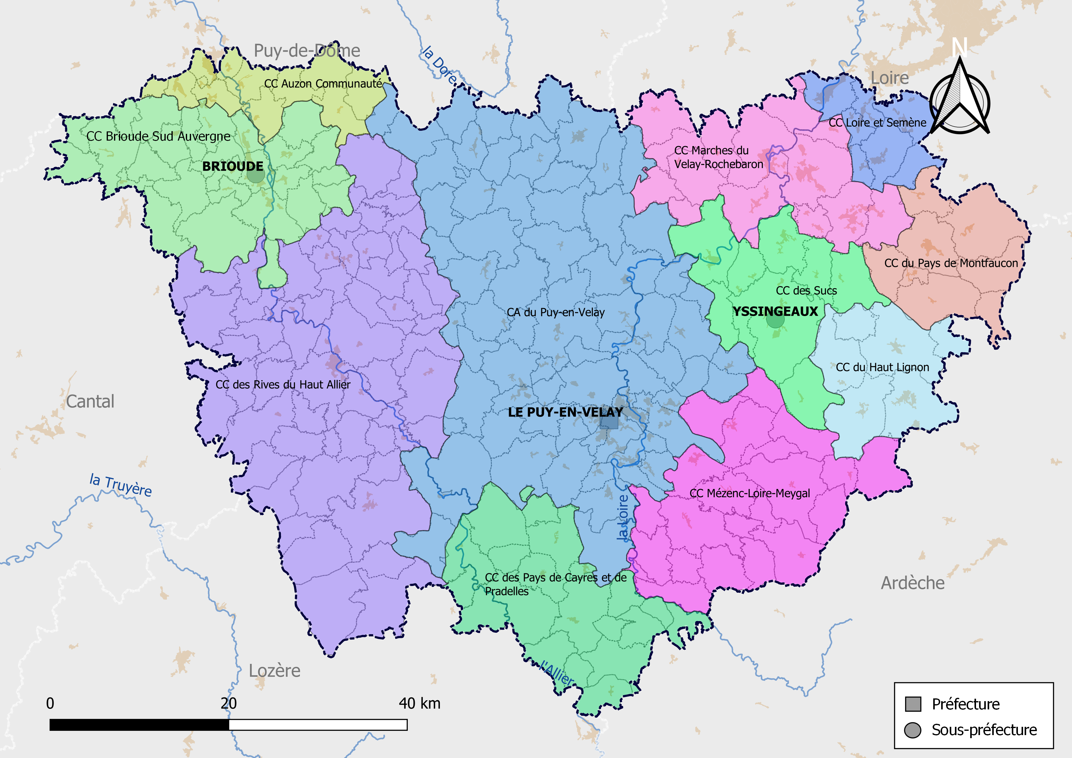 Carte des intercommunalités du département de la Haute-Loire, France. Composition au 1er janvier 2019.